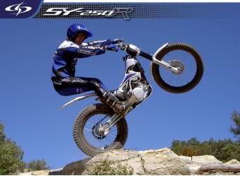 Une moto trial Scorpa SY-250R.